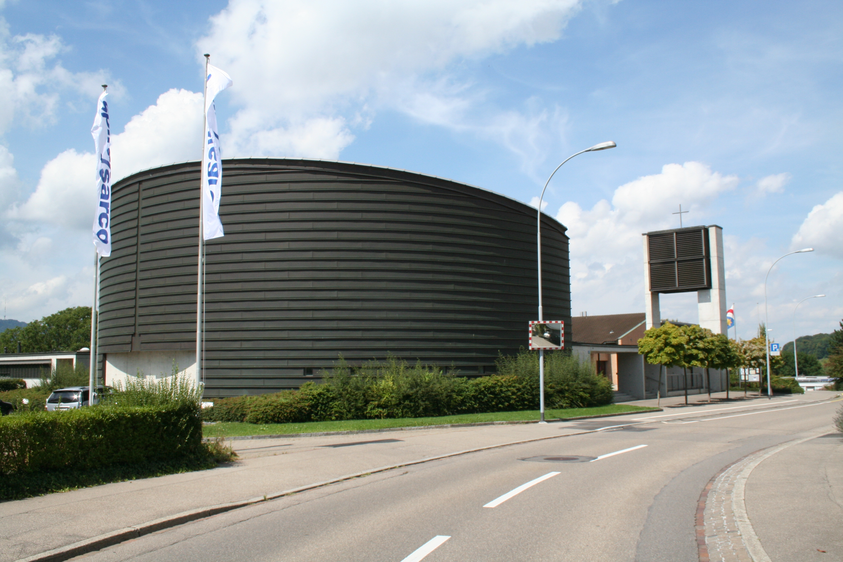 Zollikon: katholische Kirche